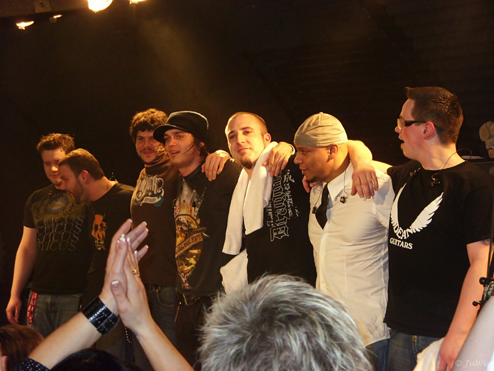 Plan A!-Tour 2009